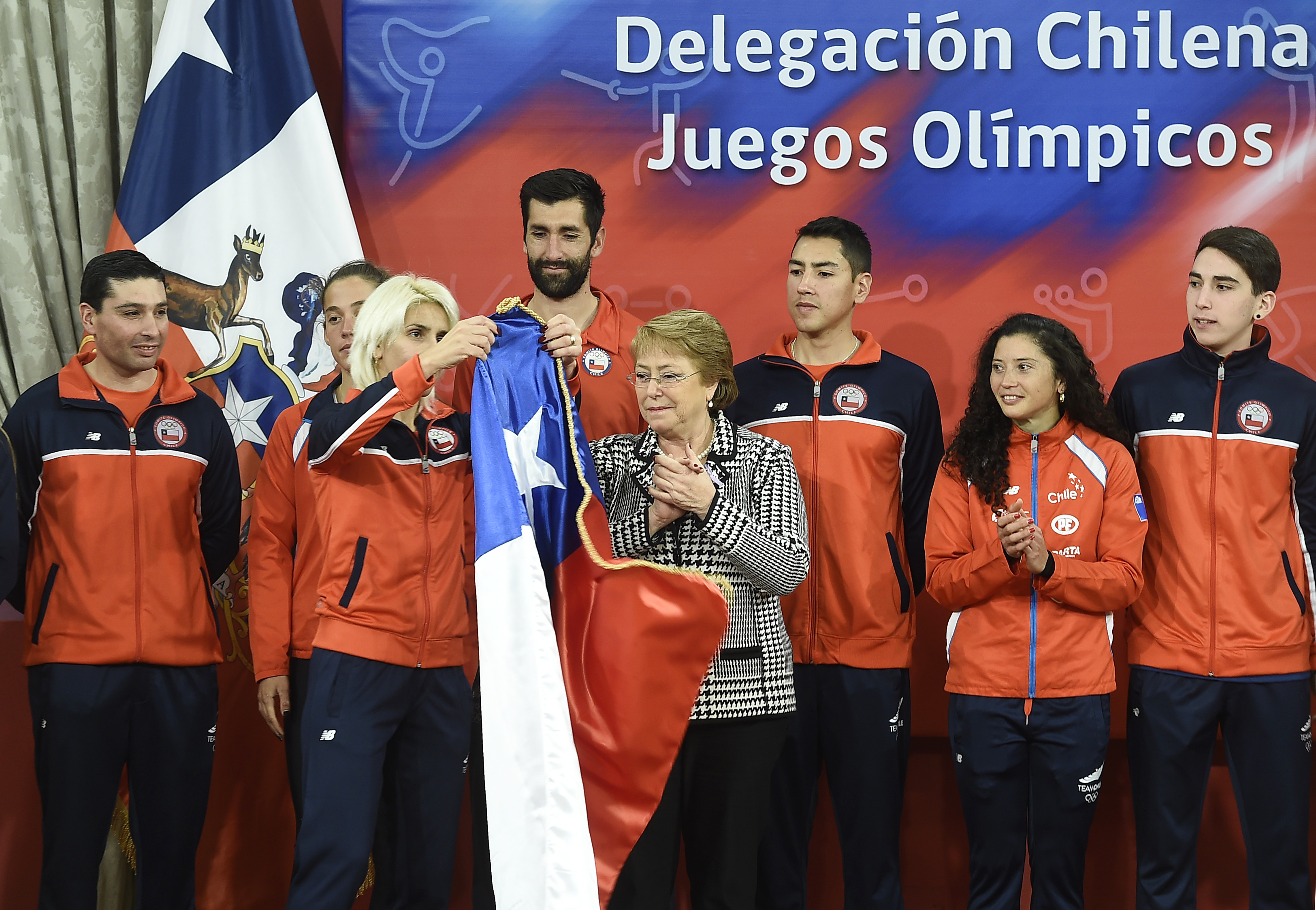 Gobierno de Chile